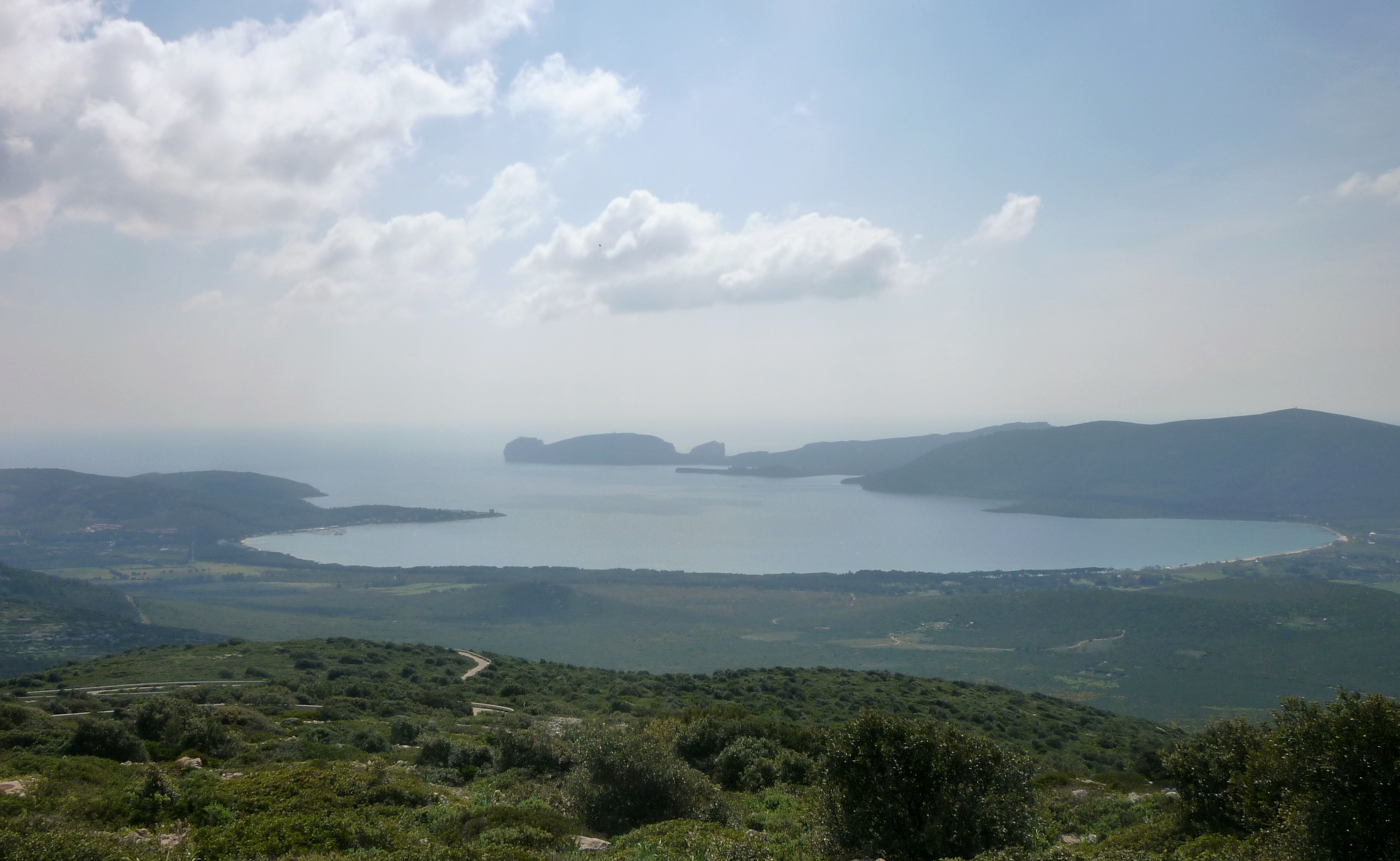 Porto Conte e Capo Caccia visti da Monte Doglia, Alghero (SS)